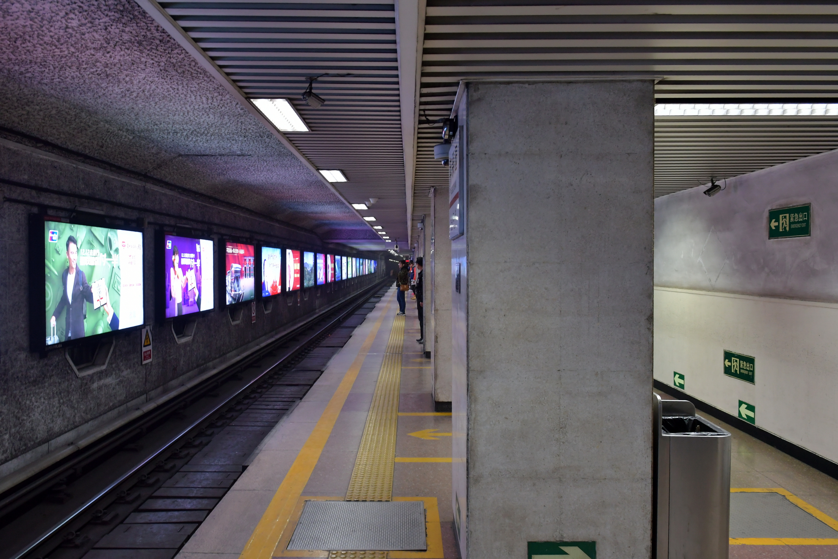 北京地铁1号线起始站苹果园站的侧式站台